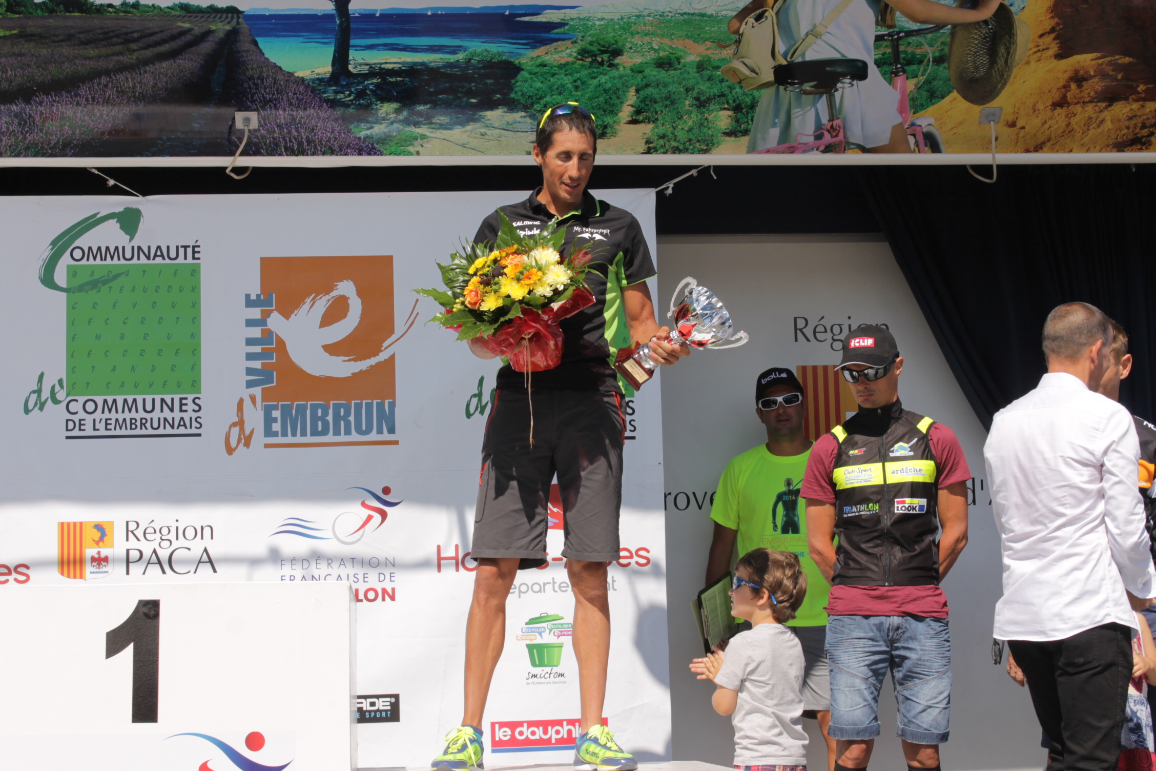 Embrunman 20116